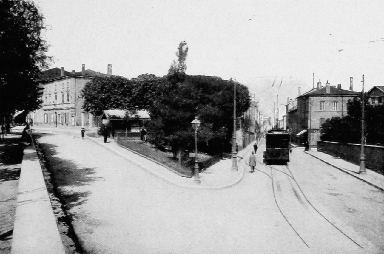 Dictionnaire illustré des communes du département du Rhône. Tome 2 / par MM. E. de Rolland et D. Clouzet.